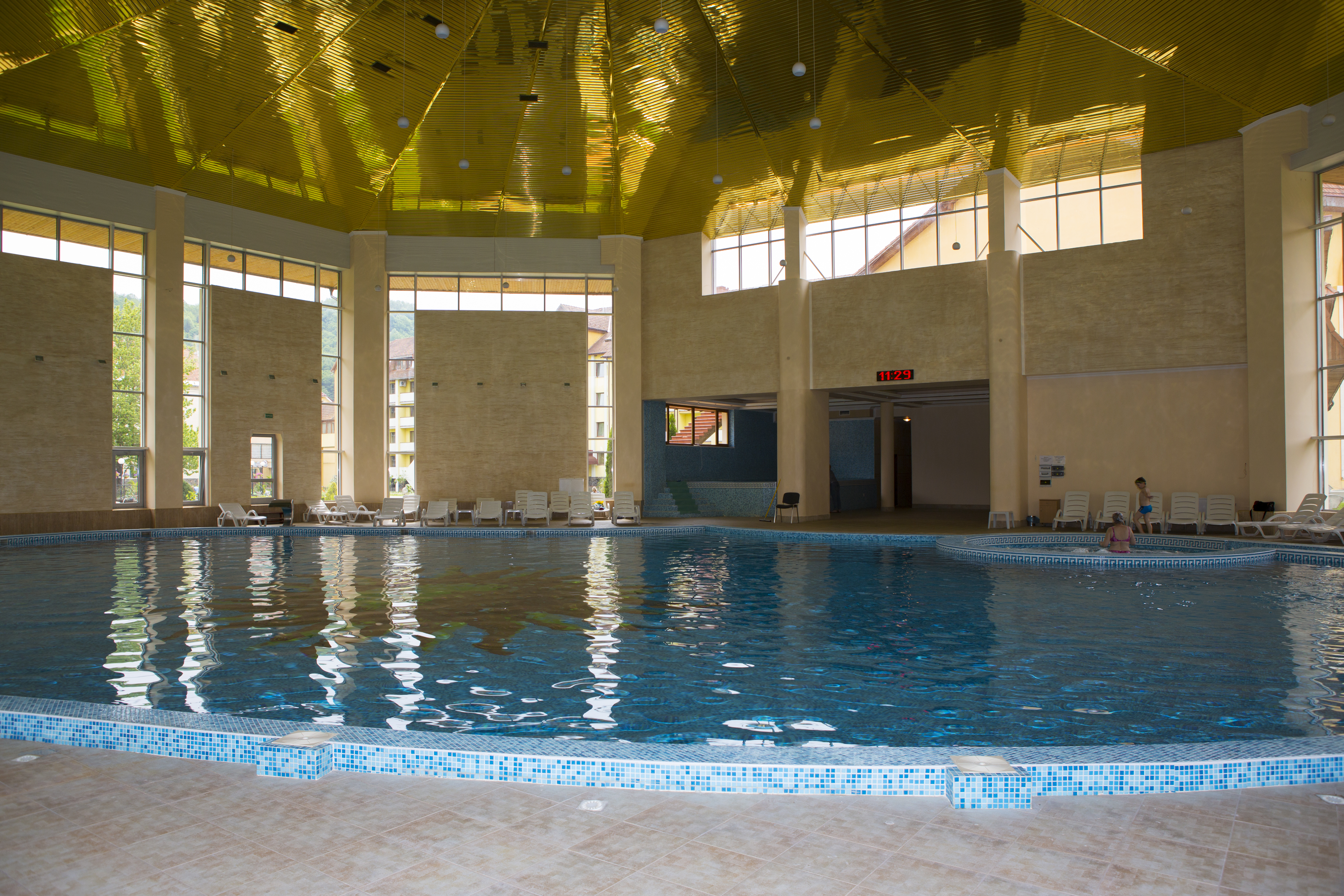 Бассейн в корпусе "Сузирья".